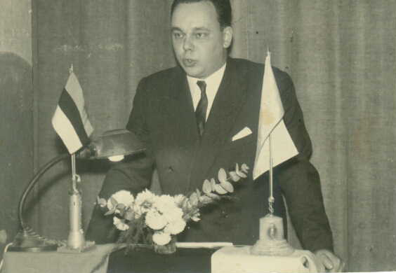 Sociedad Estonia de Buenos Aires. Discurso en la Sociedad Estonia por Allan Soonets Kippasto, inmigrante estonio nacido en la ciudad de Tartu. Allan dejó Estonia cuando tenía 12 años, en 1942, durante la guerra y llegó con su familia (su mamá, su abuela, una tía y dos primos un poco mayores que él) a Alemania y después de la guerra, en 1948, emigraron a Argentina porque tenía un tío que había llegado a Buenos Aires durante la primera guerra mundial.